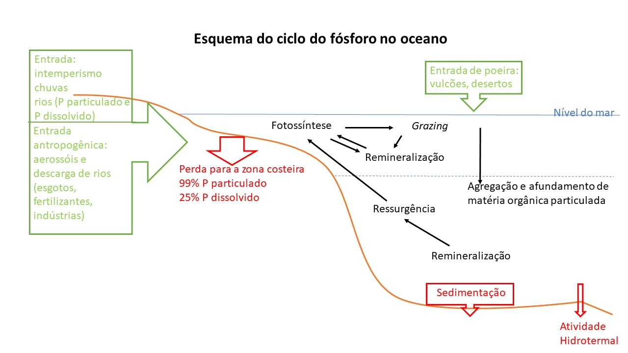 Esquema do ciclo do fósforo no oceano mostrando as fontes (entradas na cor verde) e sumidouros (na cor vermelha) do fósforo (P) e seus processos envolvidos.